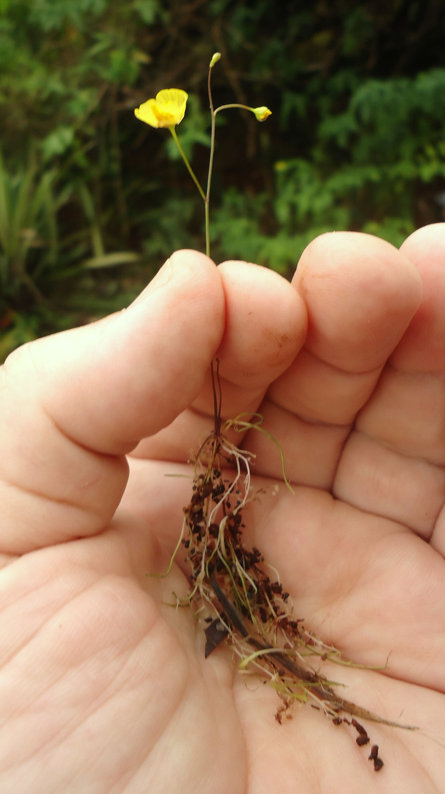 Utricularia gibba L.